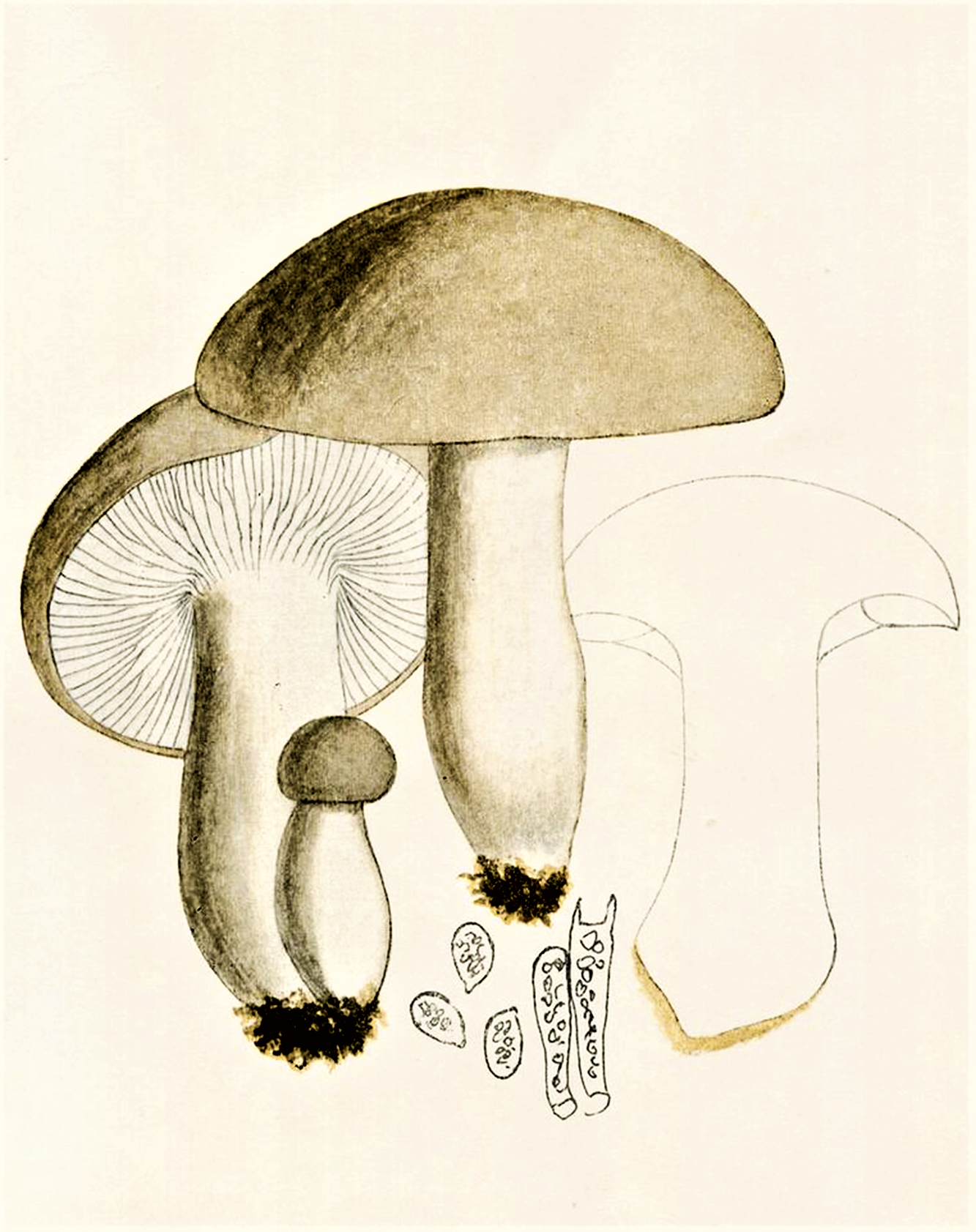 Giacomo Bresadola: Hygrophorus marzuolus (1928)